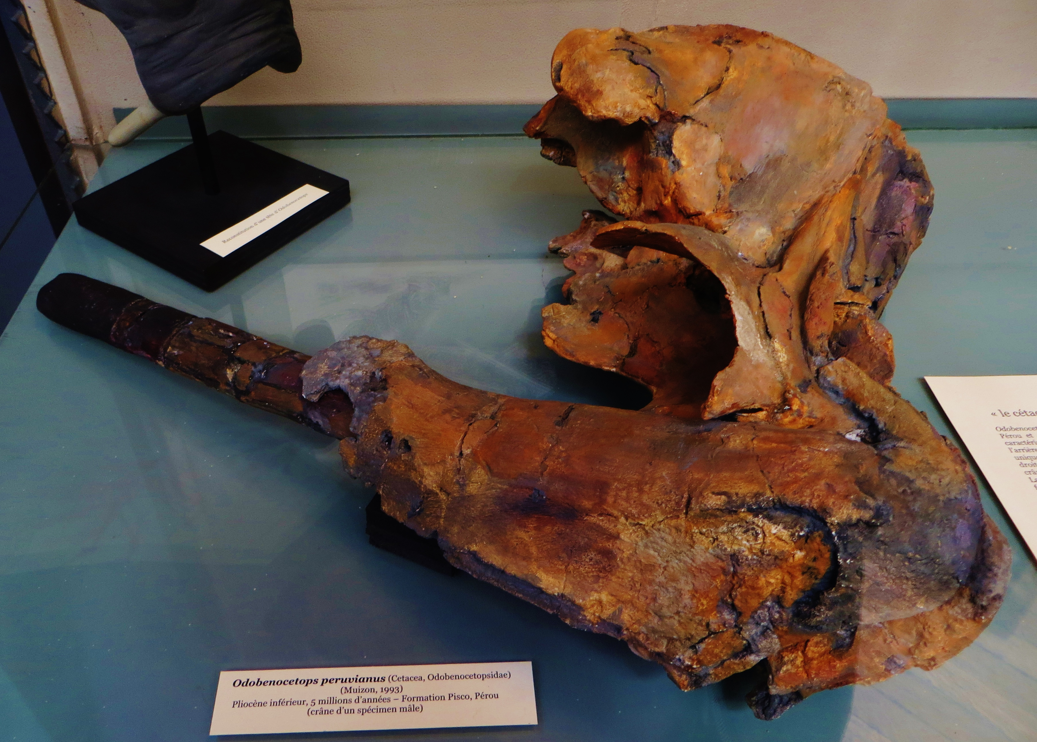 Fossil of Odobenocetops, an extinct mammal- Took the photo at Musee d'Histoire Naturelle, Paris